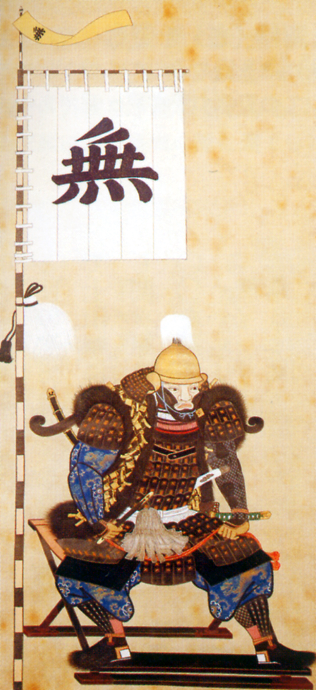 仙石秀久 Sengoku Hidehisa.